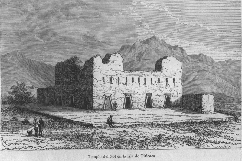 Grabado antiguo del Templo del Sol en la Isla del Titicaca